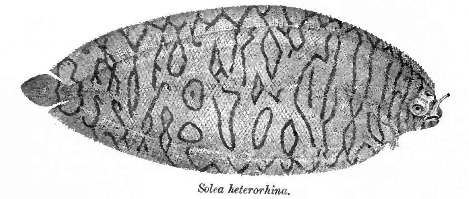 Soleichthys heterorhinos (Bleeker, 1856) syn. Solea heterorhina